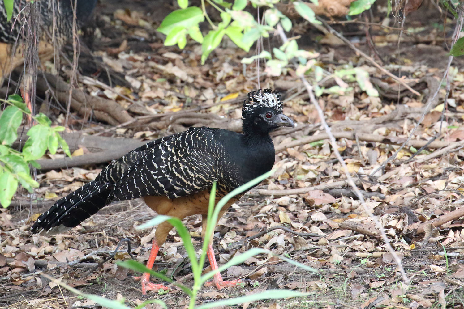 Hocco à face nue, Pantanal (Brésil)